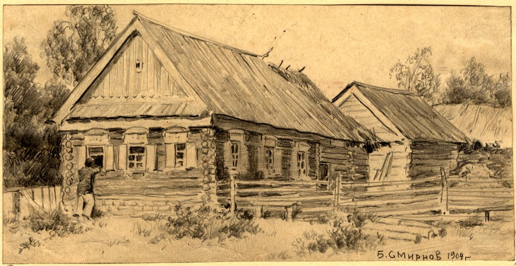 Башҡортса: Рәссам Б.В. Смирновтың "Башҡорт ауылы" тигән һүрәте